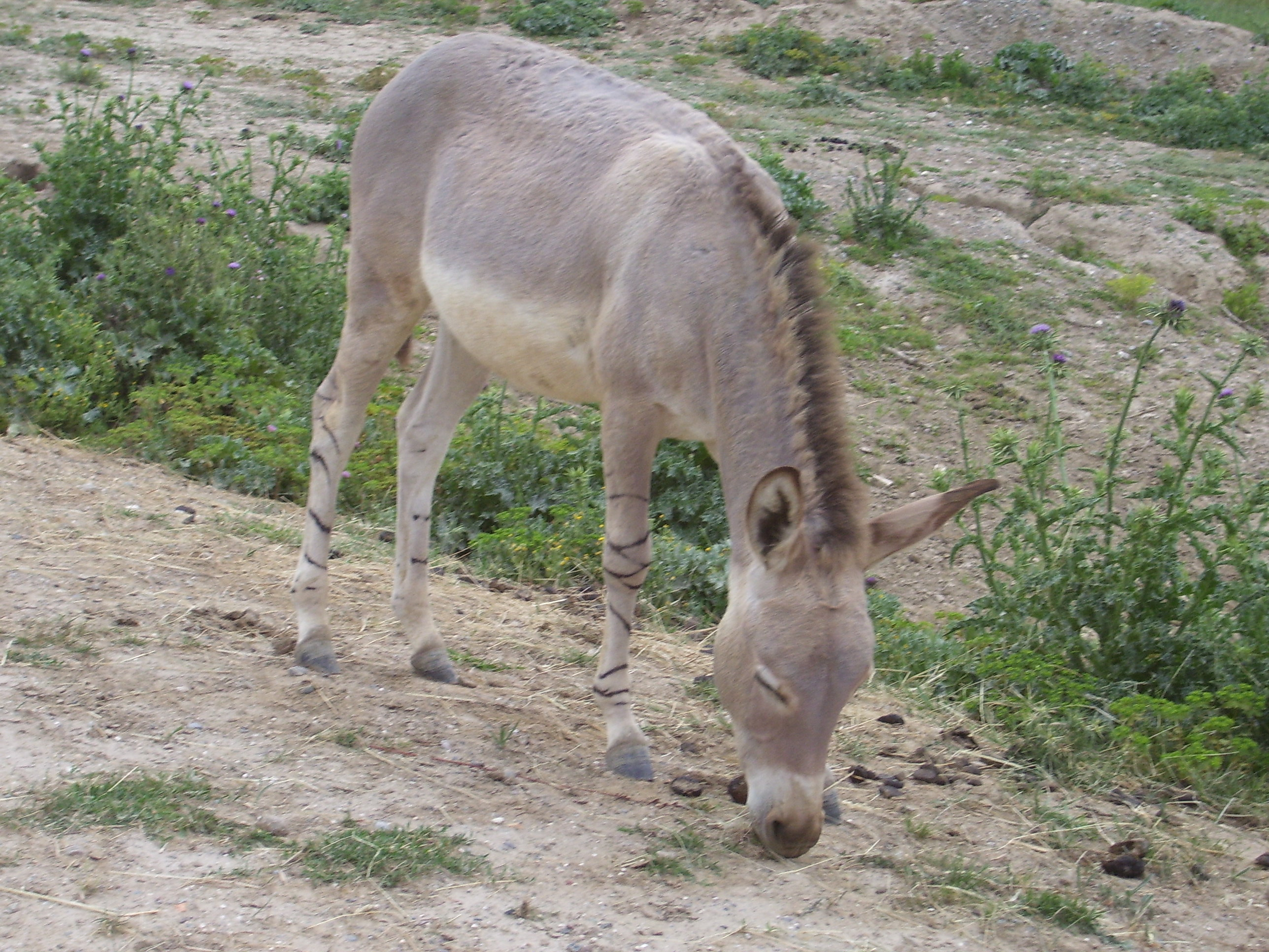 Âne de Somalie (Equus africanus somaliensis) de la réserve africaine de Sigean (France).